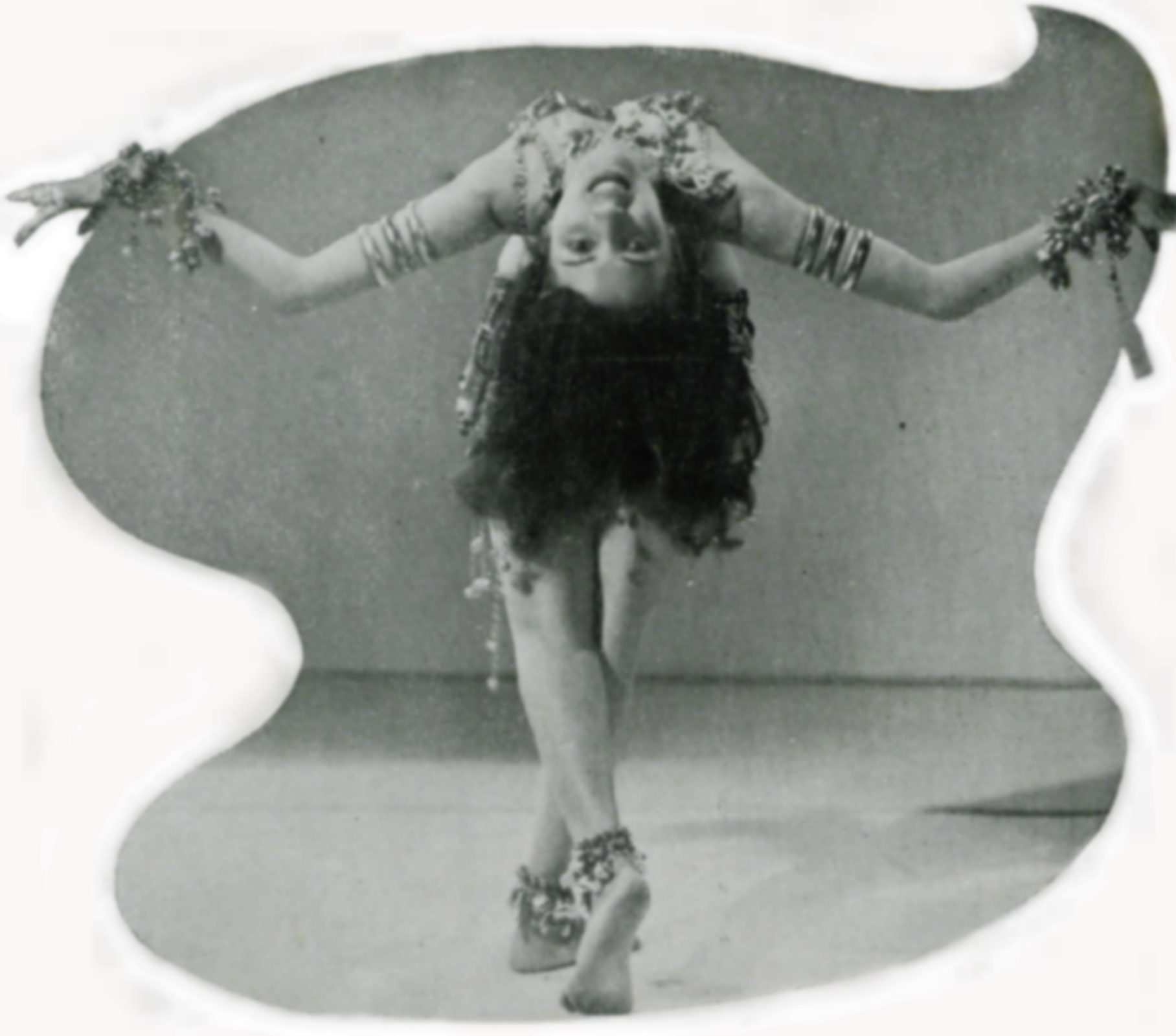 Eros Volúsia (Rio de Janeiro, 1 de junho de 1914 — 1 de janeiro de 2004) foi uma dançarina brasileira. Na imagem, Eros aparece numa propaganda da loção Leite de Rosas, em 1945.